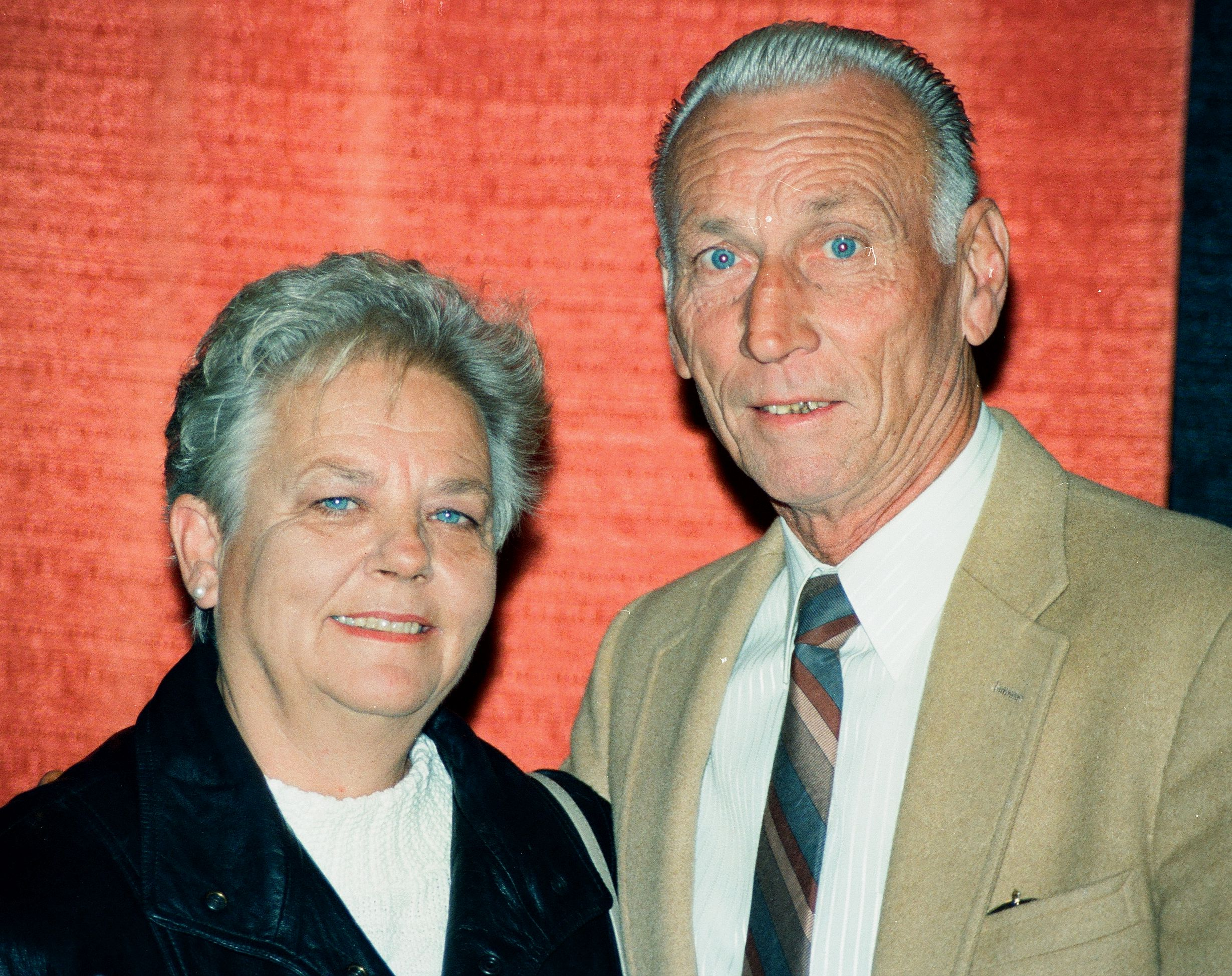 Baltimore M.D. 1996